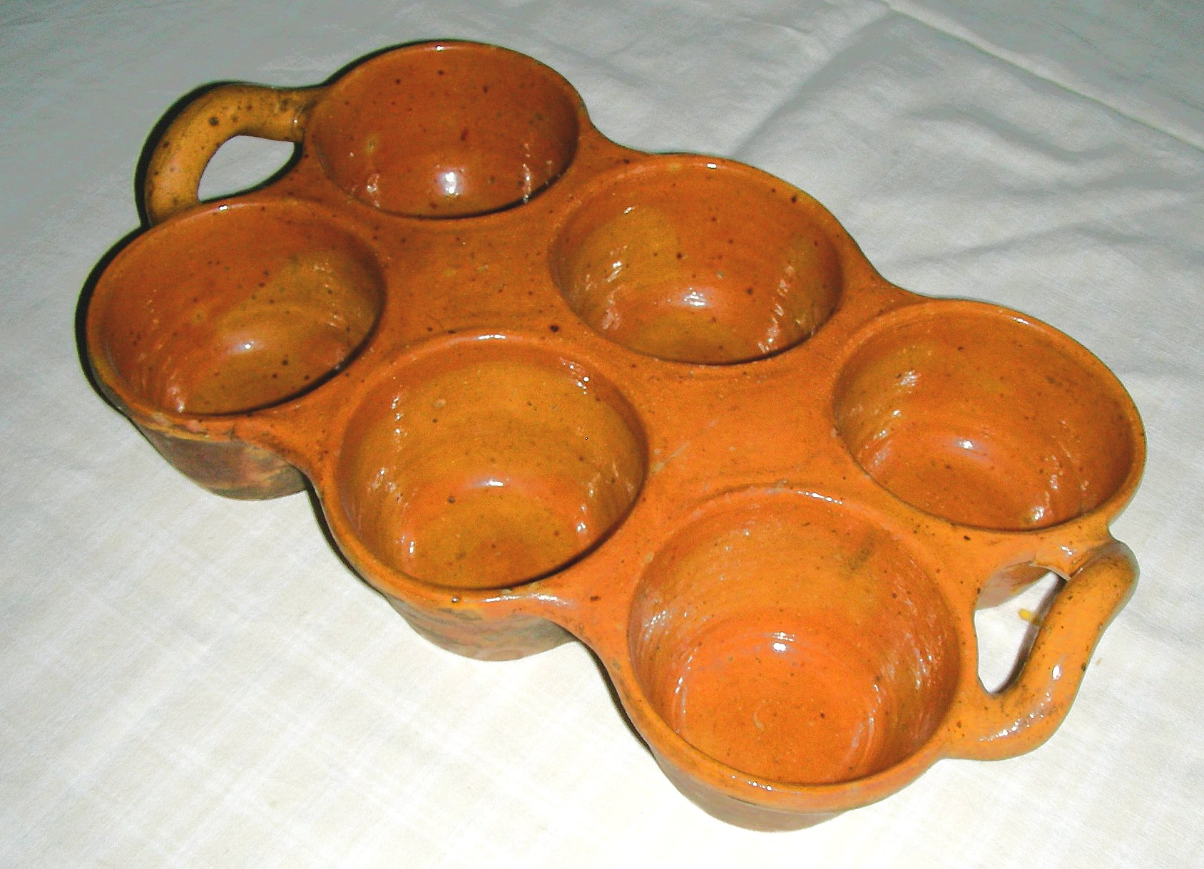 Pfitzaufform aus Steingut